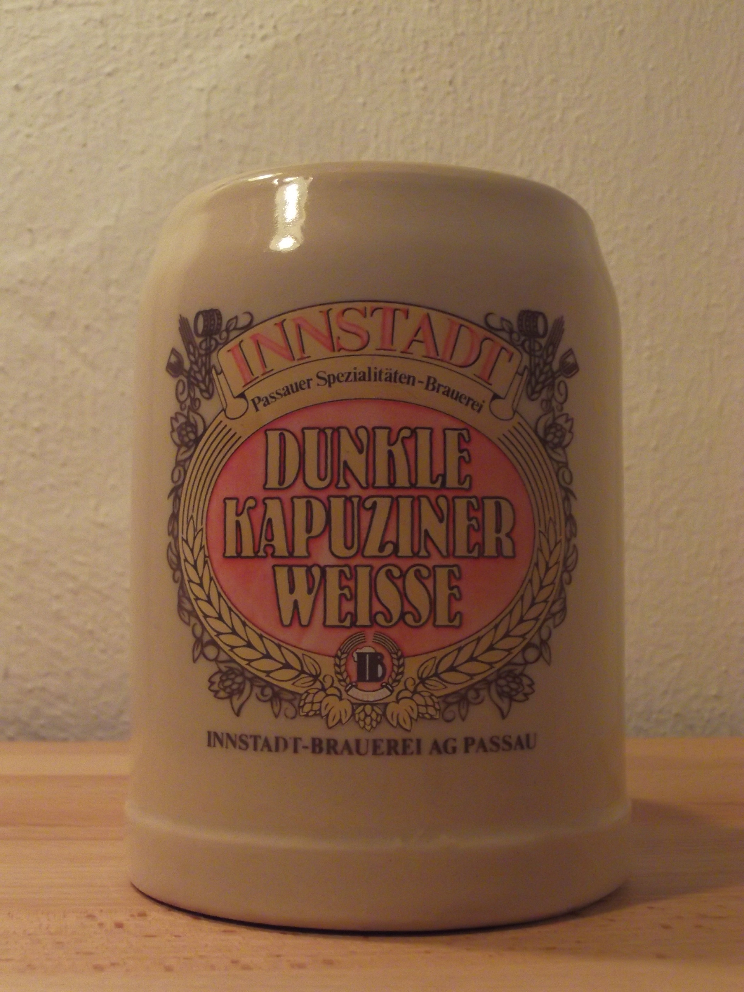 Tonkrug der ehemaligen Innstadt-Brauerei Passau